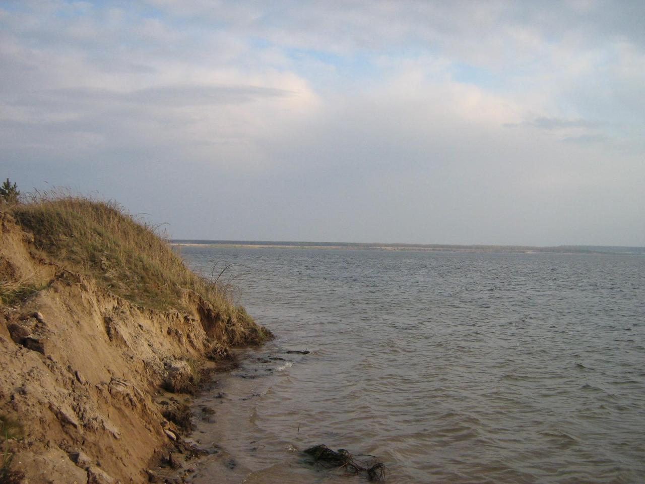 Der "Sedlitzer See" in Brandenburg.